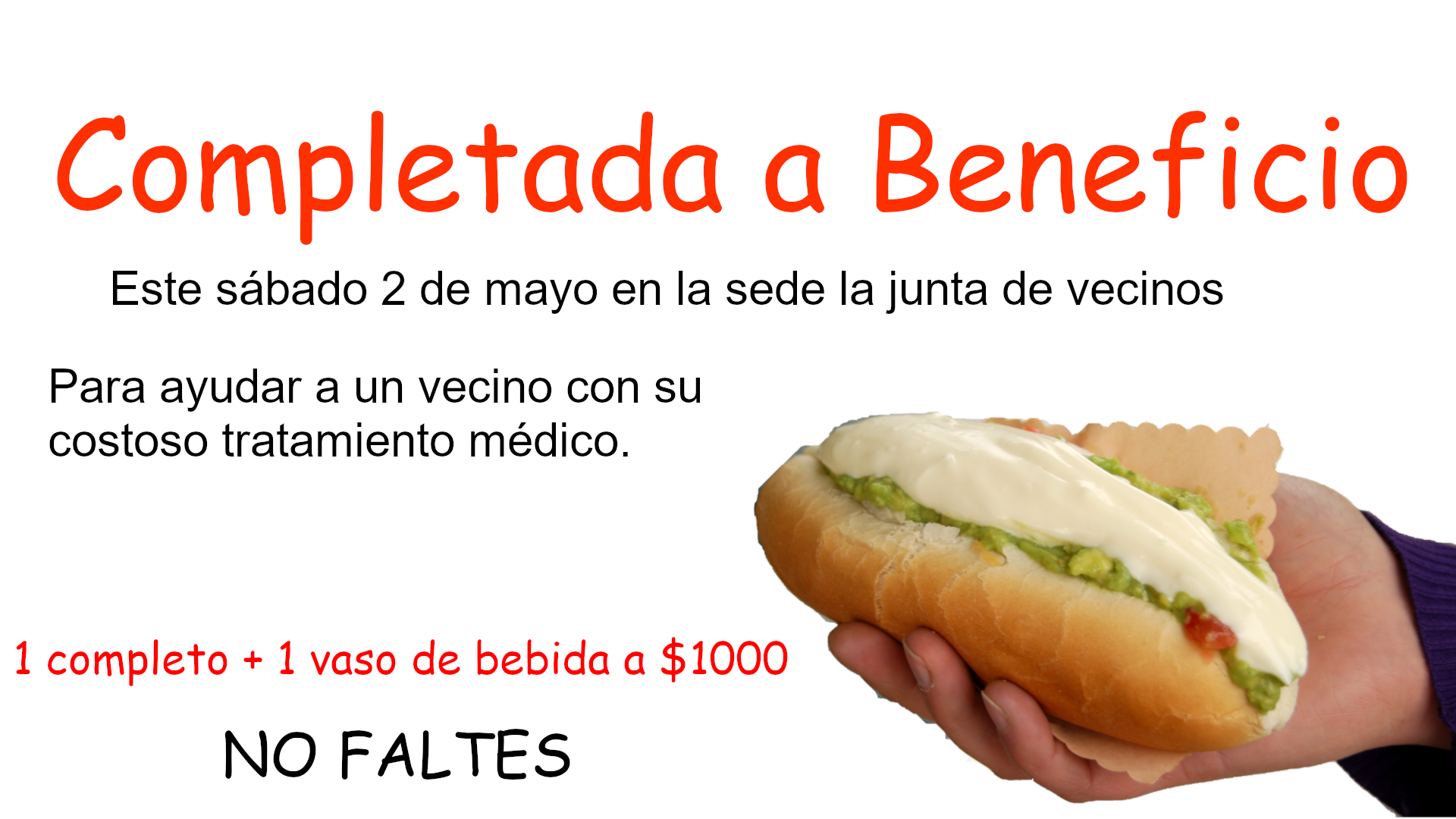 Cartel ficticio de una completada a beneficio, tomando la imagen del completo italiano del archivo que aparece en el siguiente link: File:Completo_italiano.jpg